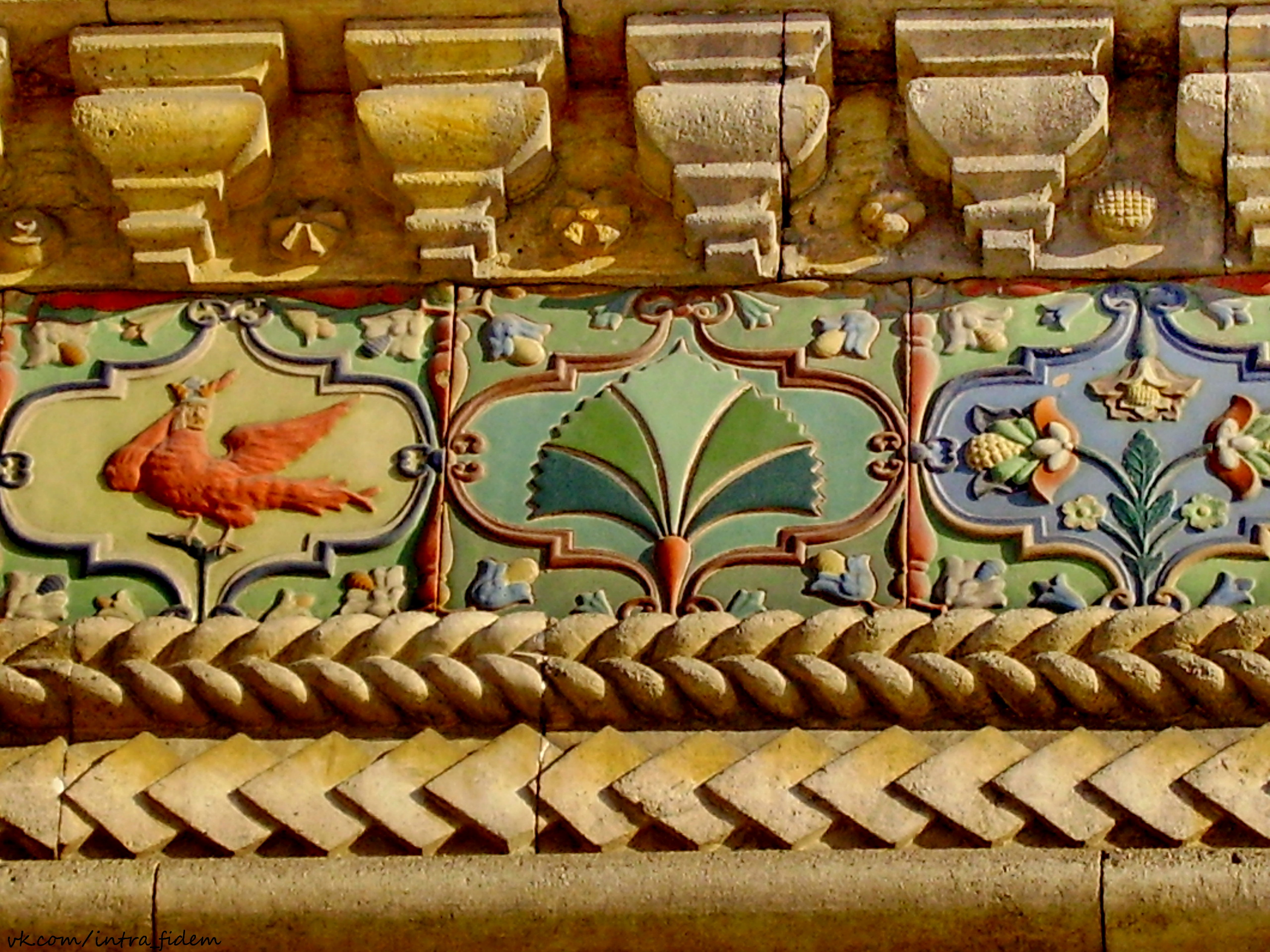 Усадьба Игумнова Н. В. (Москва и Московская область, Москва, Большая Якиманка улица, 43)